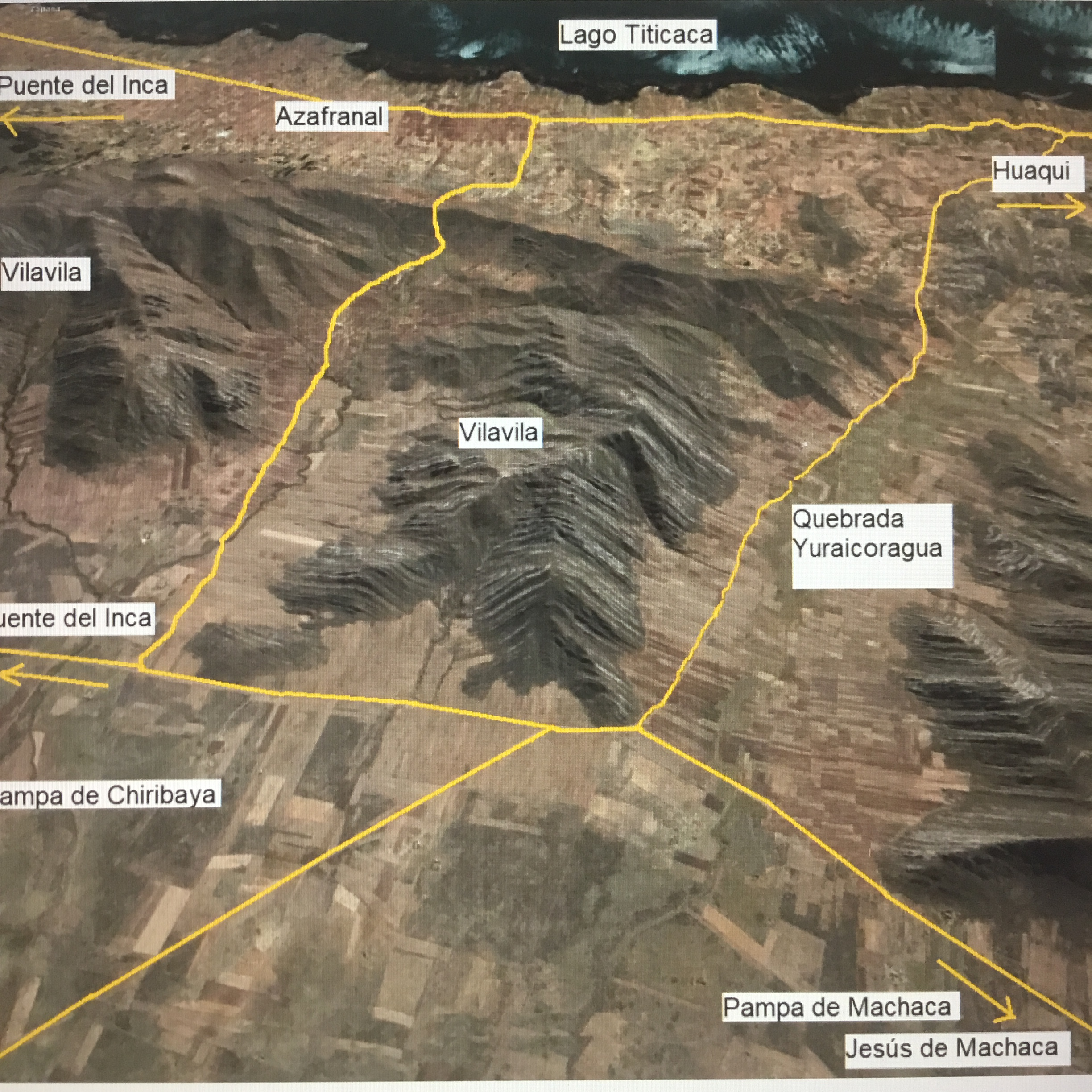 Batalla de Huaqui 20/6/1811. Lado Sur de la Quebrada de Yuraicoragua .